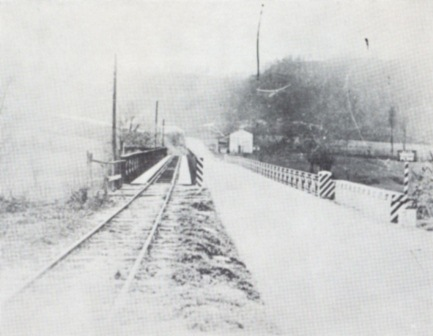 Ponte sul Pesio della SS 28 e della tranvia Fossano-Mondovì-Villanova.